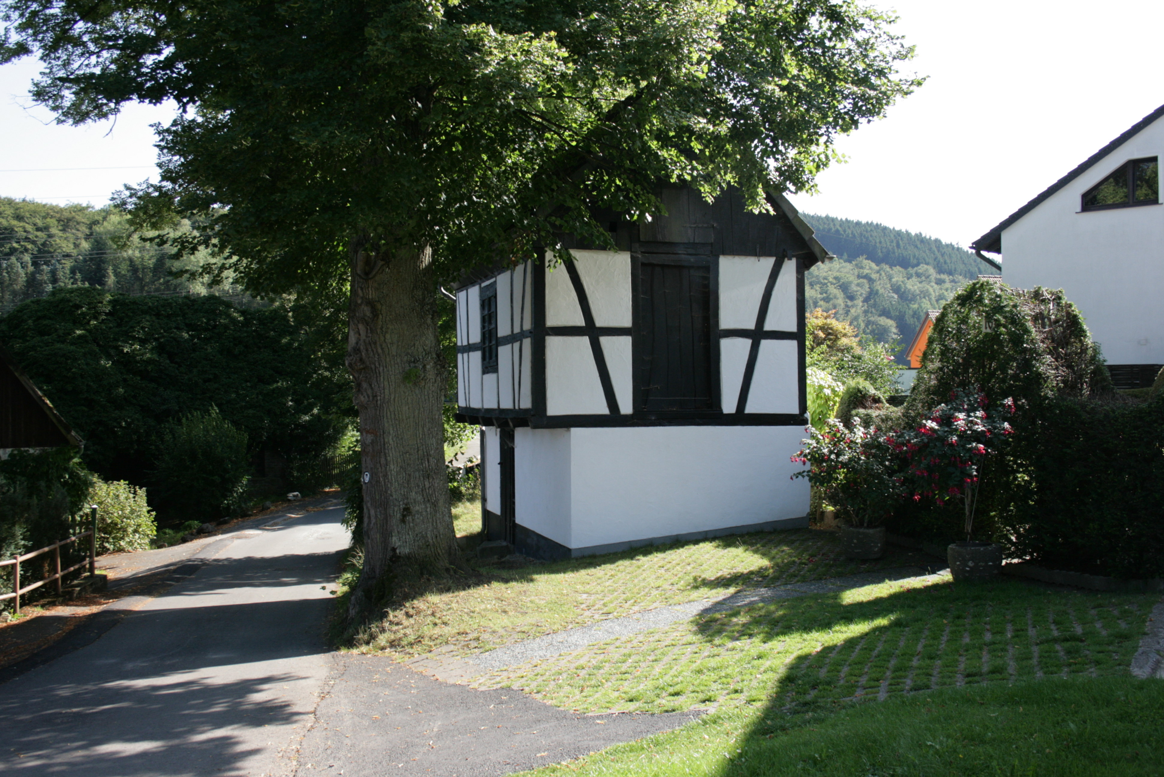 Haferkasten in Alt Pungelscheid in Werdohl